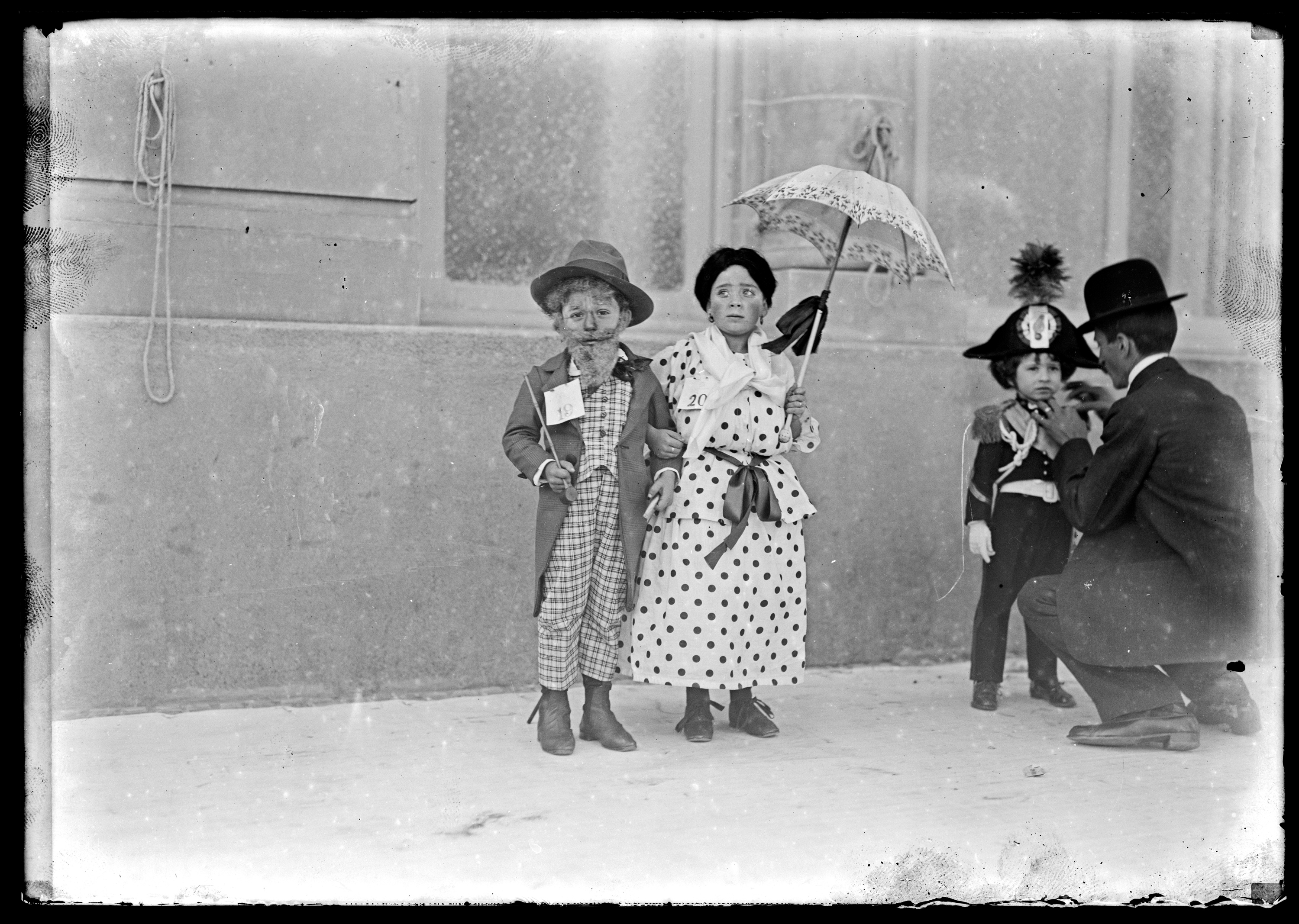 S.i. Fiesta de Carnaval. Explanada del Parque Hotel